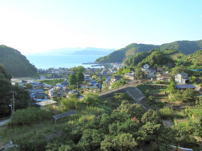 肥薩おれんじ鉄道 海浦駅 周辺の様子 芦北広域農道の陸橋 上から、北西方向を見る。 写真中央が駅、左側が川内駅方面、右側が八代駅方面。 奥の海は八代海。 撮影者/著者/著作権保有者 : MK Products 撮影日 : 2009/10/10 海浦駅用にアップロードした画像です。良い画像があれば別の画像に変えてください。 Description Landscape of Uminoura Station. Hisatsu-orange Railway Company. |GFDL|cc-by-3.0 Landscape of Uminoura Station. Hisatsu-orange Railway Company.